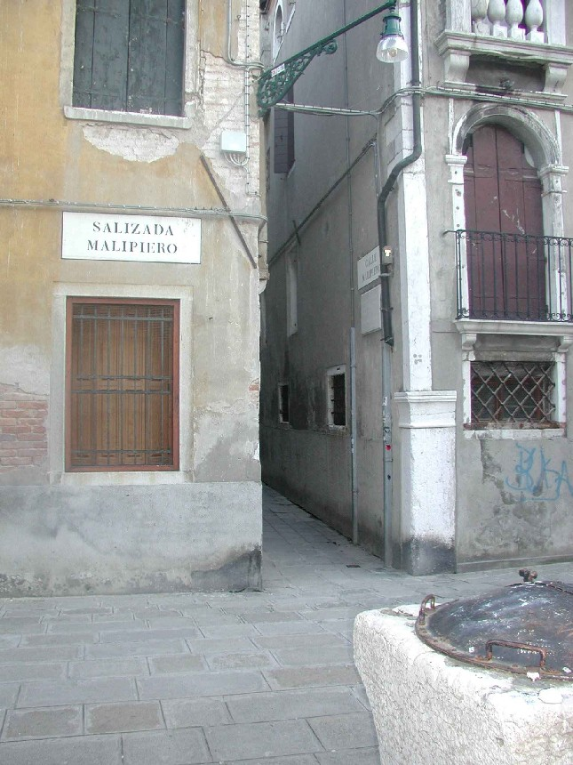 Calle della Commedia (ora Malipiero) La foto è stata scattata a Venezia (Italia) nell'aprile 2004. Dalla salizada (calle lastricata) Malipiero si vede l'imbocco della Calle Malipiero (già Calle della Commedia). Categoria:Immagini di Venezia